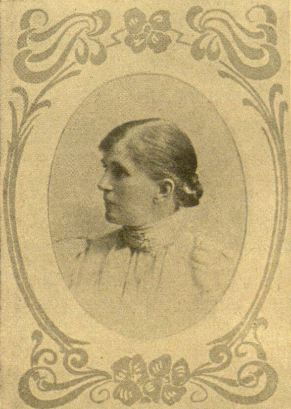 Portrait der deutschen Schriftstellerin Hedwig Kiesekamp.